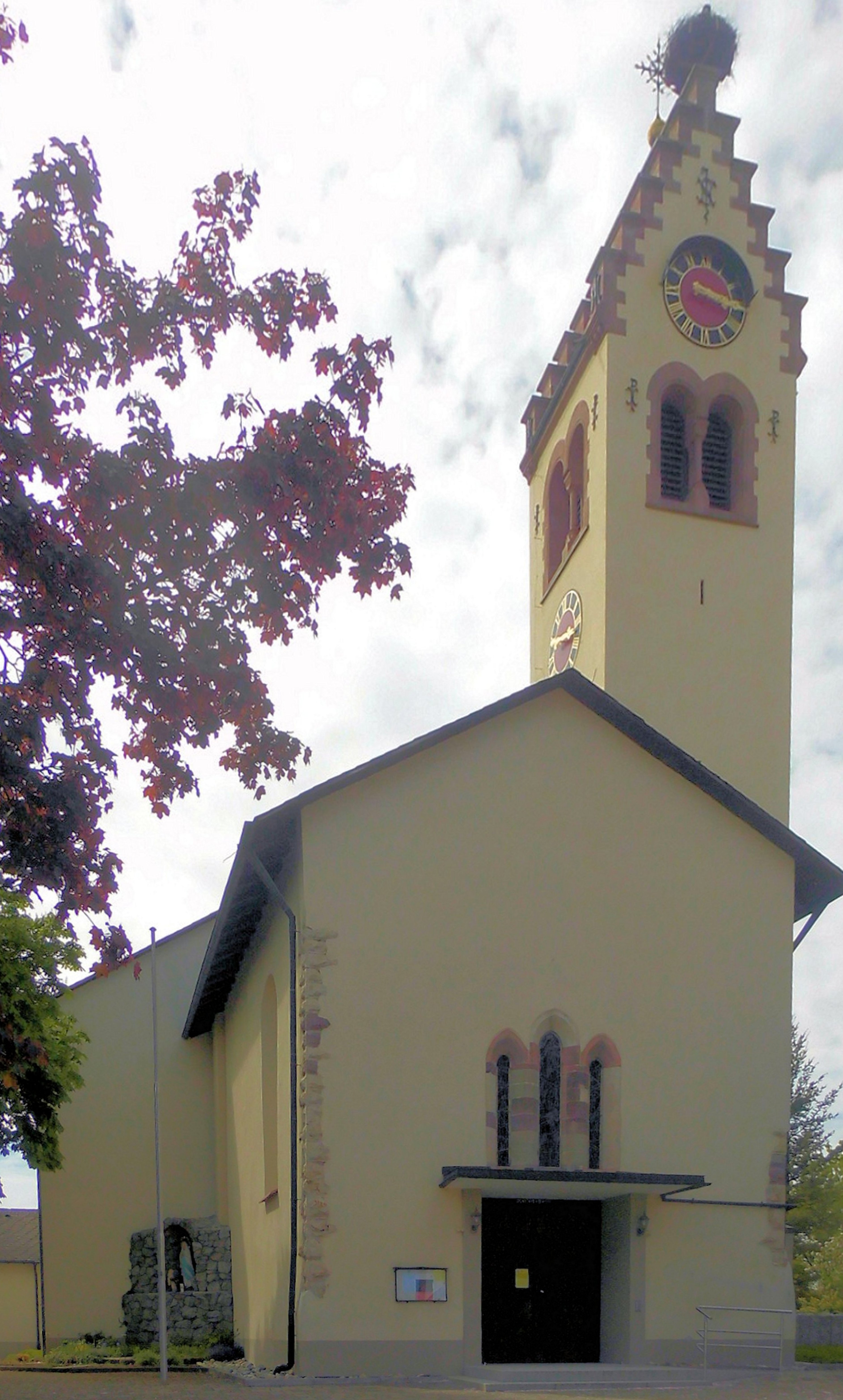 Kirche St. Johannes der Täufer in Pfohren, Stadt Donaueschingen, Deutschland